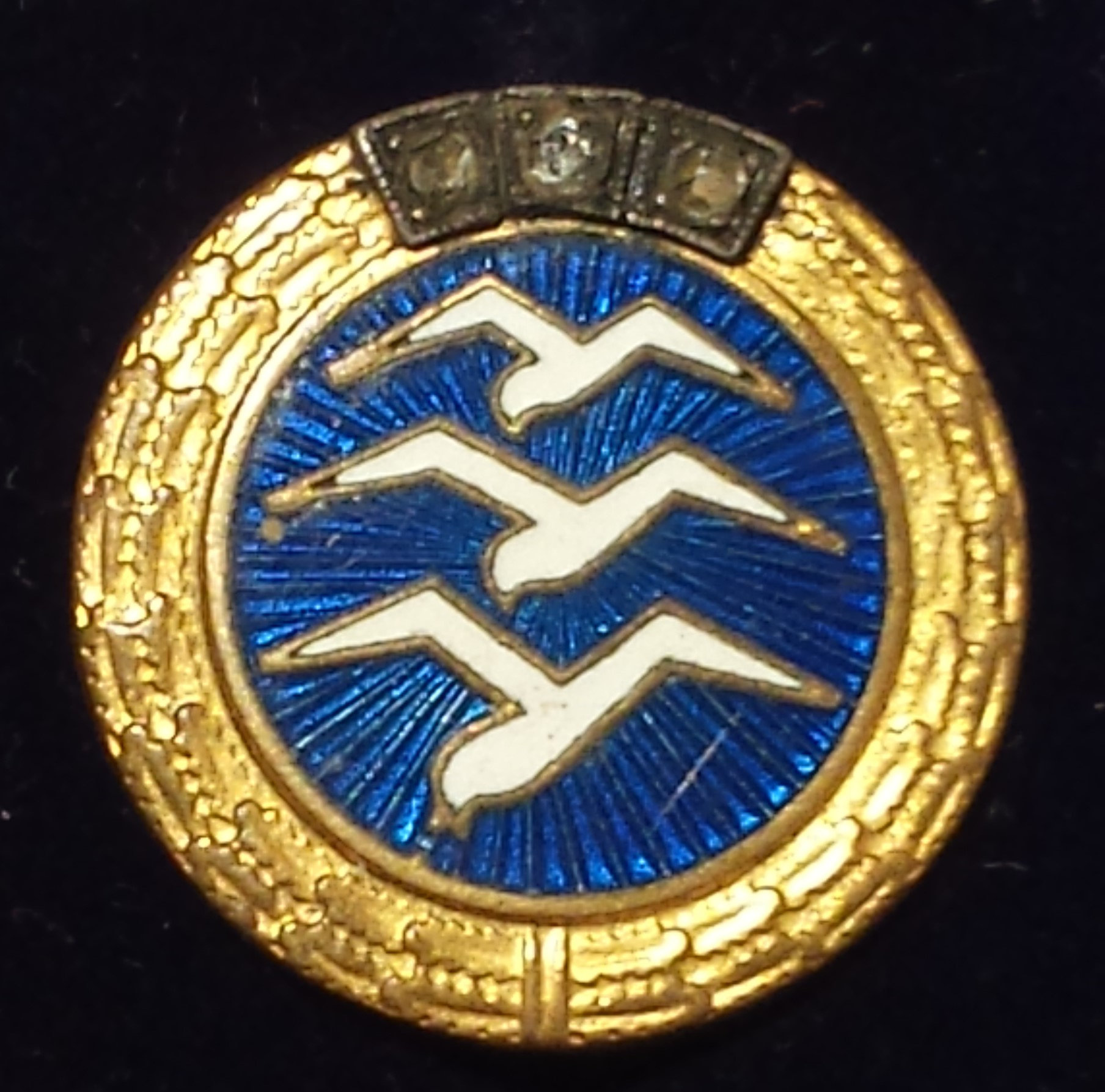 Złota Oznaka Szybowcowa, 1959